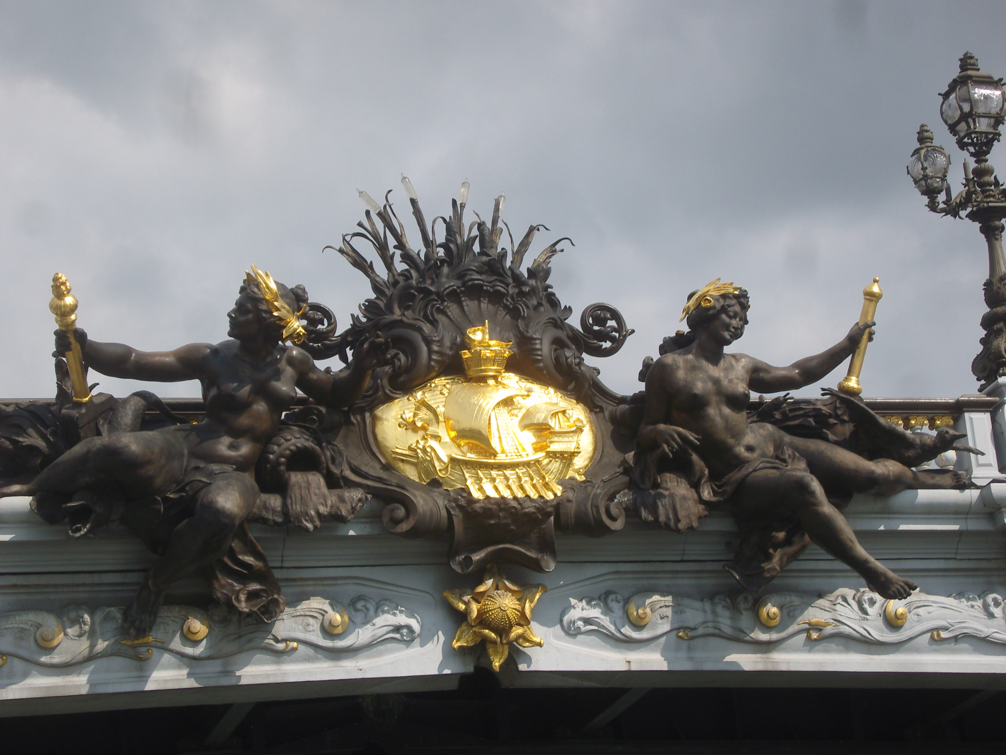 Georges Récipon (Français, 1860-1920): Les nymphes de la Seine avec les armes de Paris, 1900, cuivre martelé, motif central sur le parapet aval du Pont Alexandre-III, Paris, France.